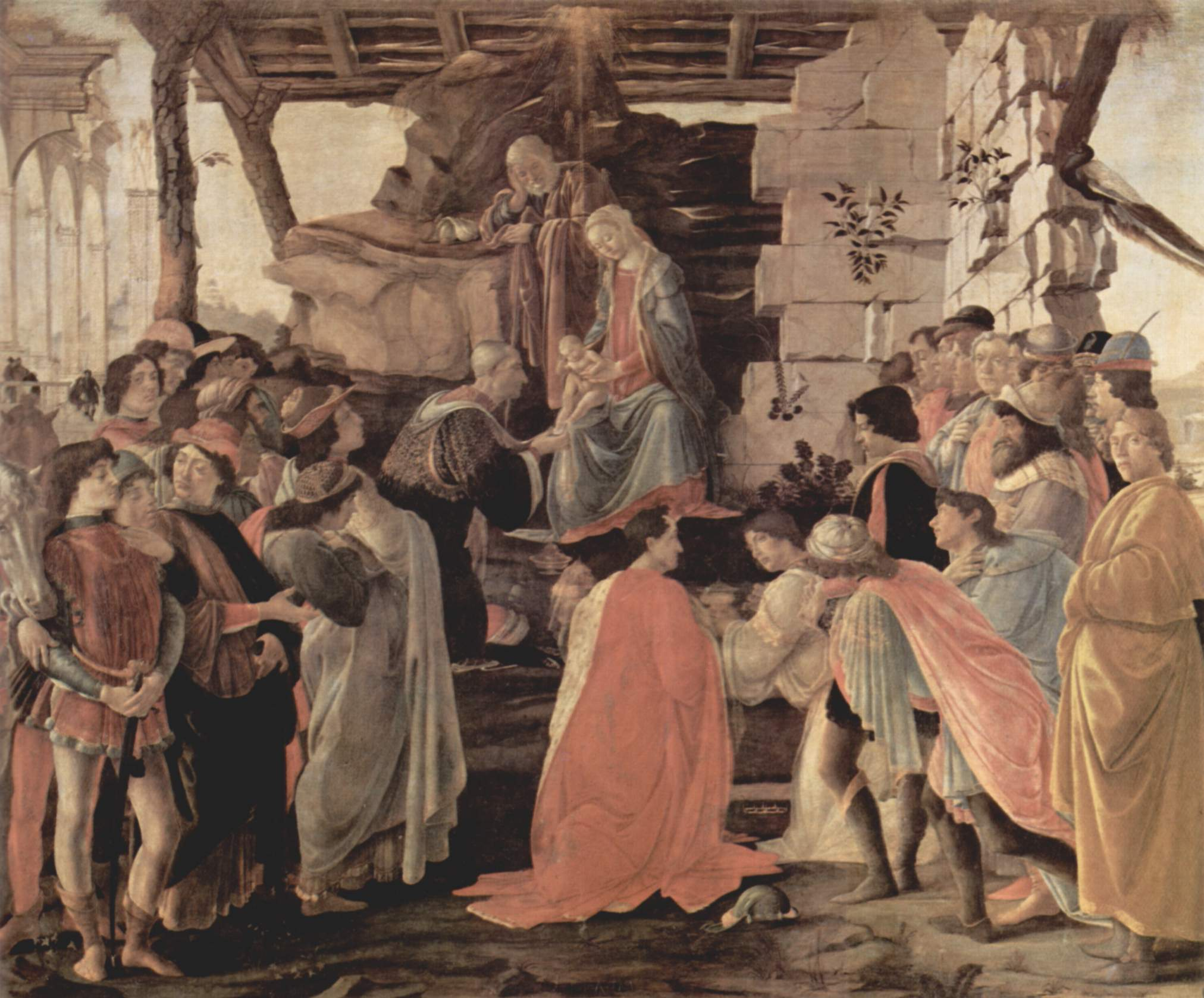 Darstellung der Mitglieder der Medici-Familie als Könige: Cosimo (kniend), Piero und Giovanni (Rückenfiguren im Mittelpunkt) und Angehörige des Medici-Hofes